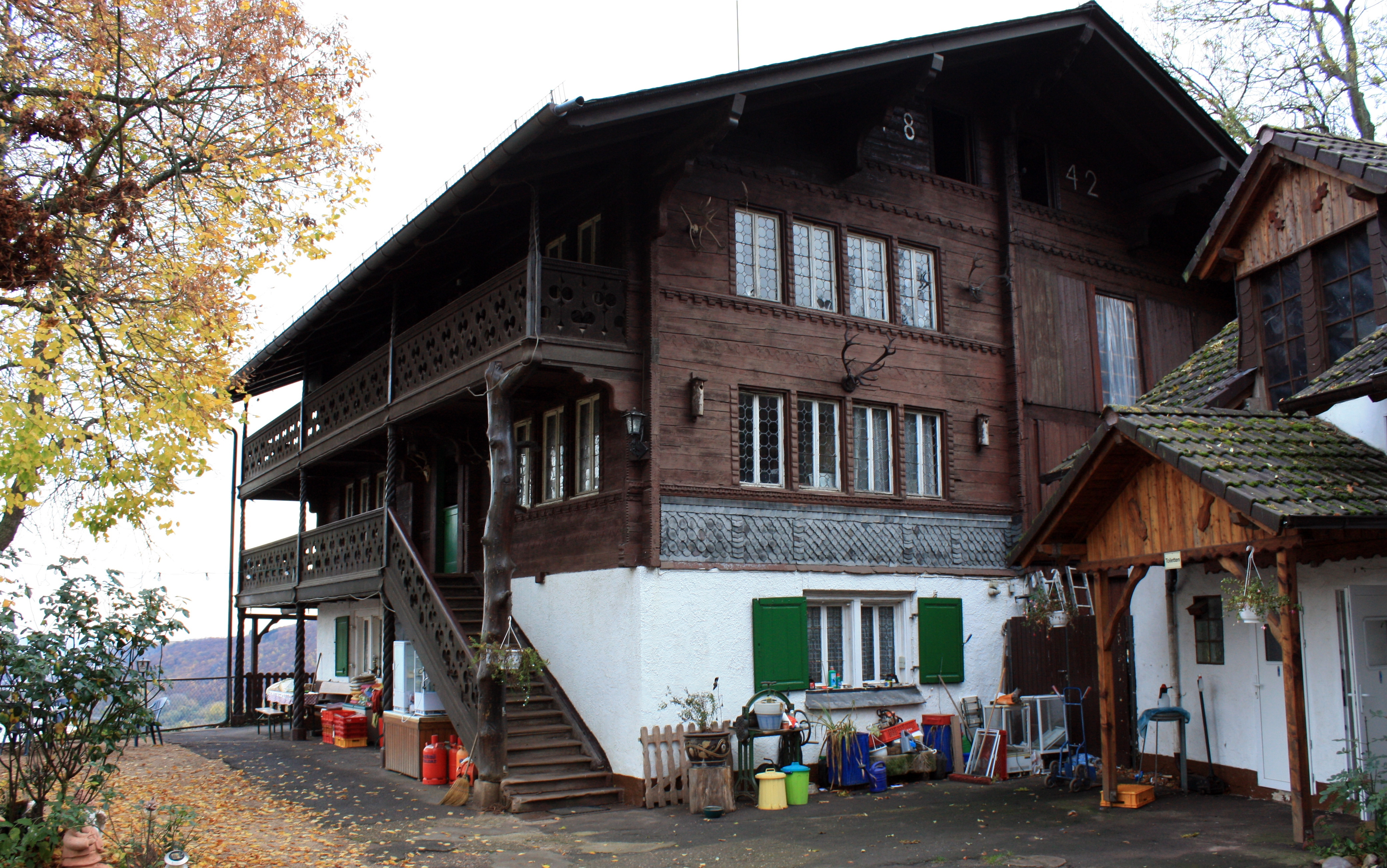 Die Wald-Gaststätte Schweizerhaus in Trechtingshausen im Oberen Mittelrheintal. Die Aufnahme entstand am 07.11.2015. IMG 3811